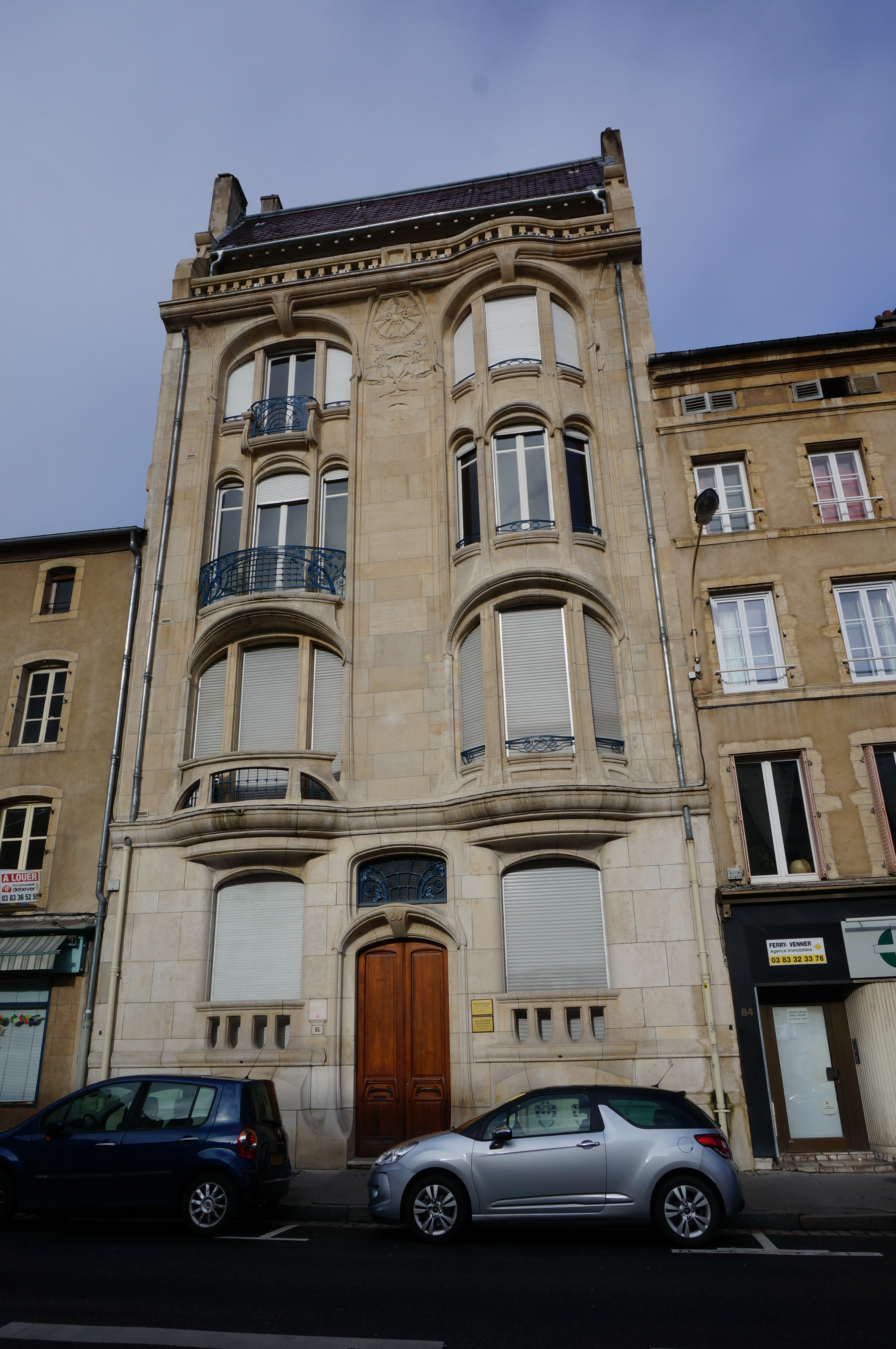 Immeuble Margo au 86 rue Stanislas, Monument historique de Nancy.